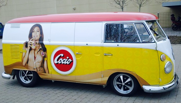 Volkswagen Type 2 med Eva Mendes Cocio-reklame.